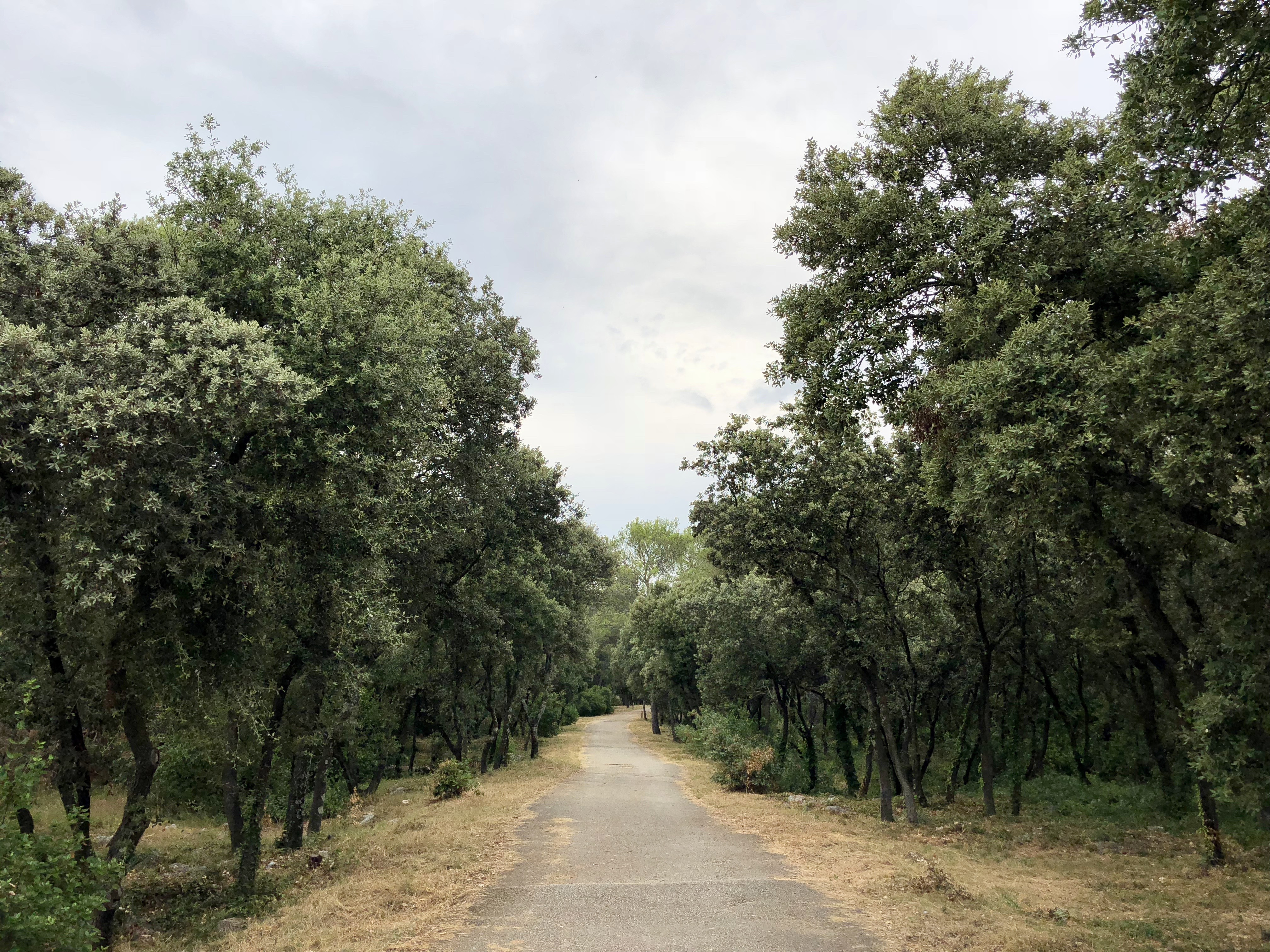 Bois de Montmaur wilderness area in Montpellier.